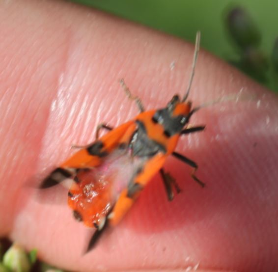 Ritterwanze (Lygaeus equestris) beim Abflug, am 28. Juli 2018 in der Schwetzinger Hardt